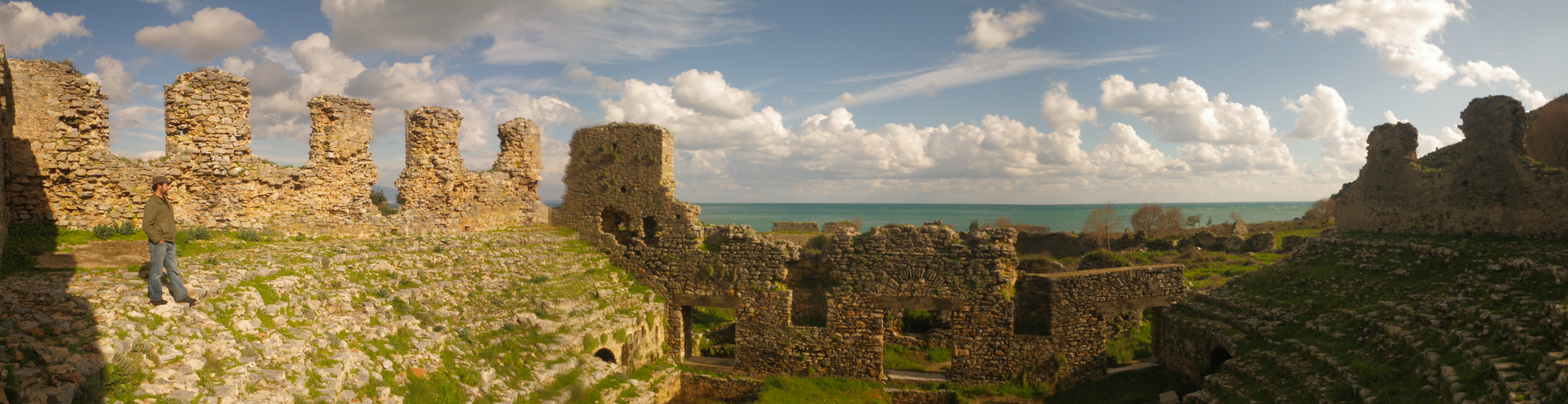 Anamur Anamurium odion